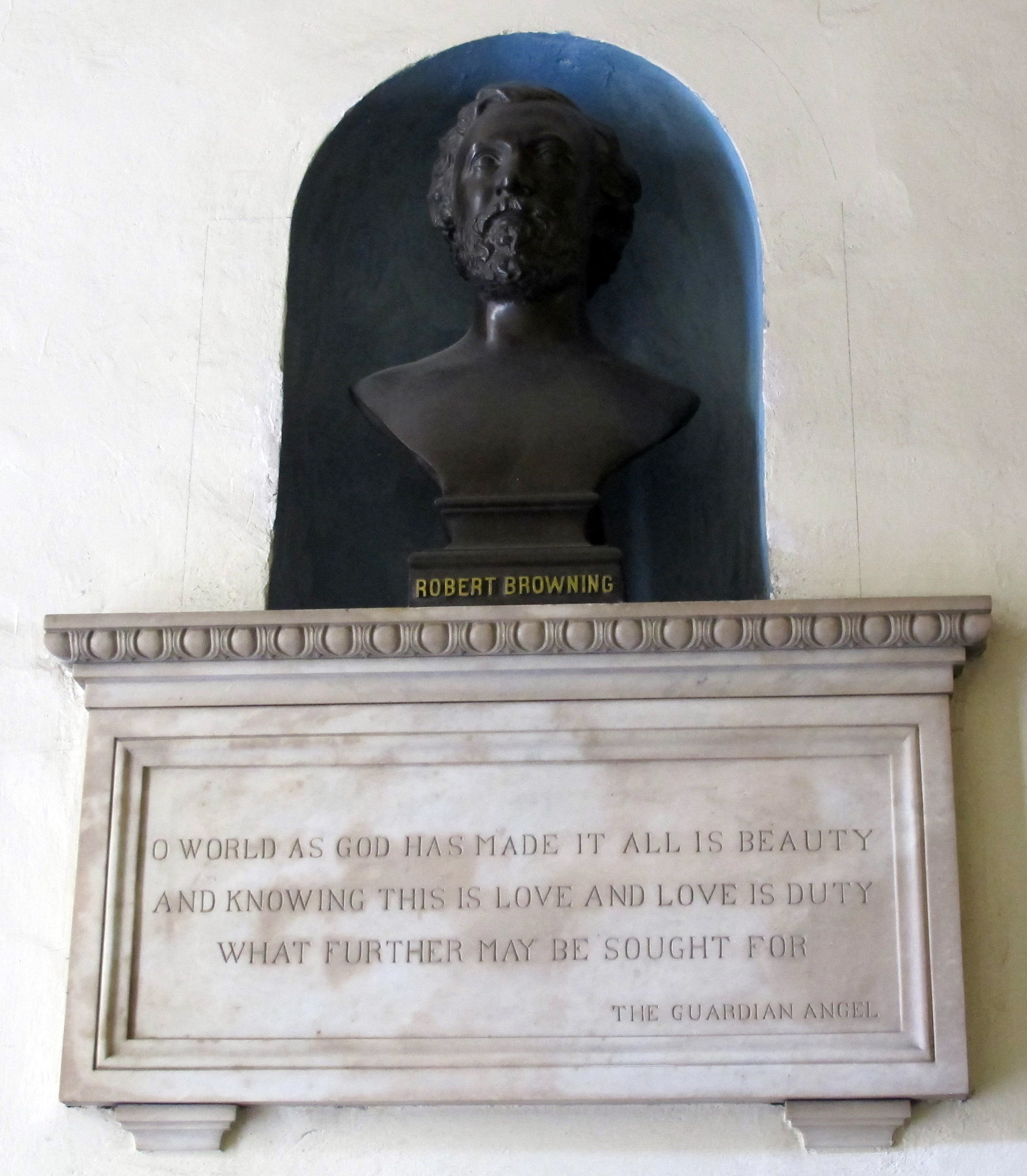 Casa guidi, busto di robert browning